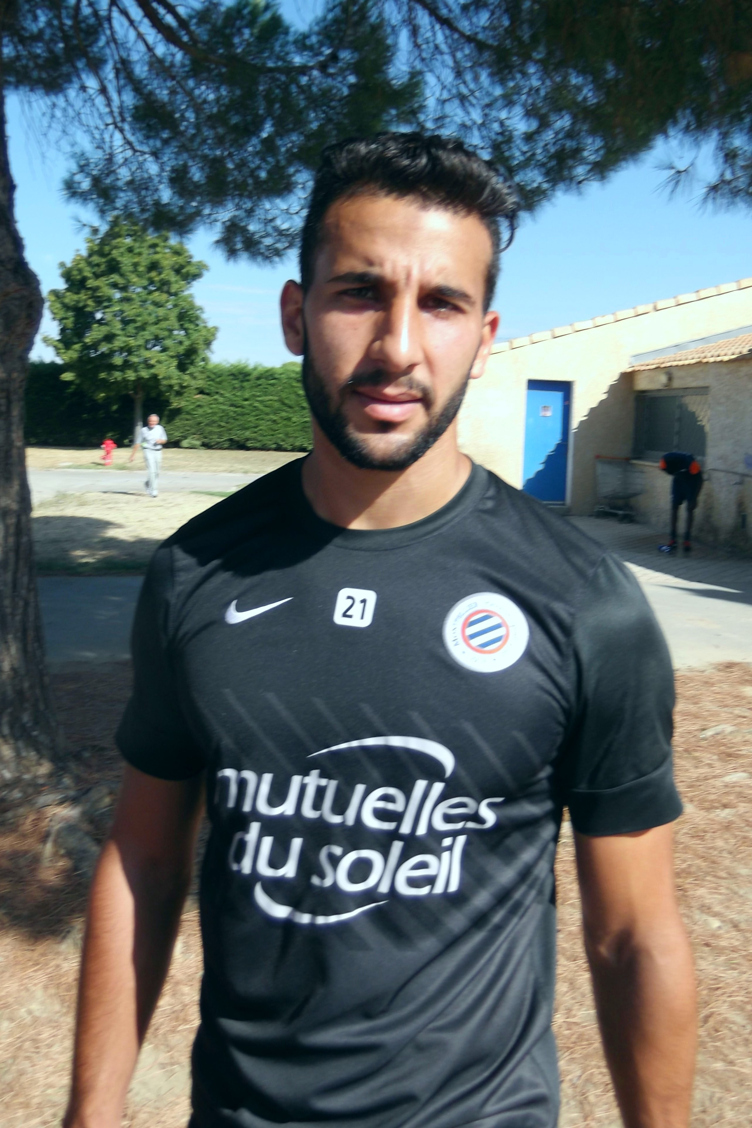 Août 2013.